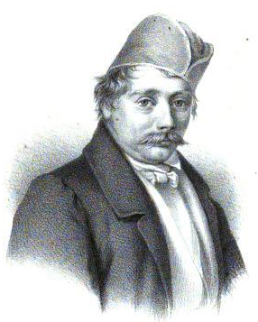 Norsk (bokmål): Thomas Fearnley (1802–1842)